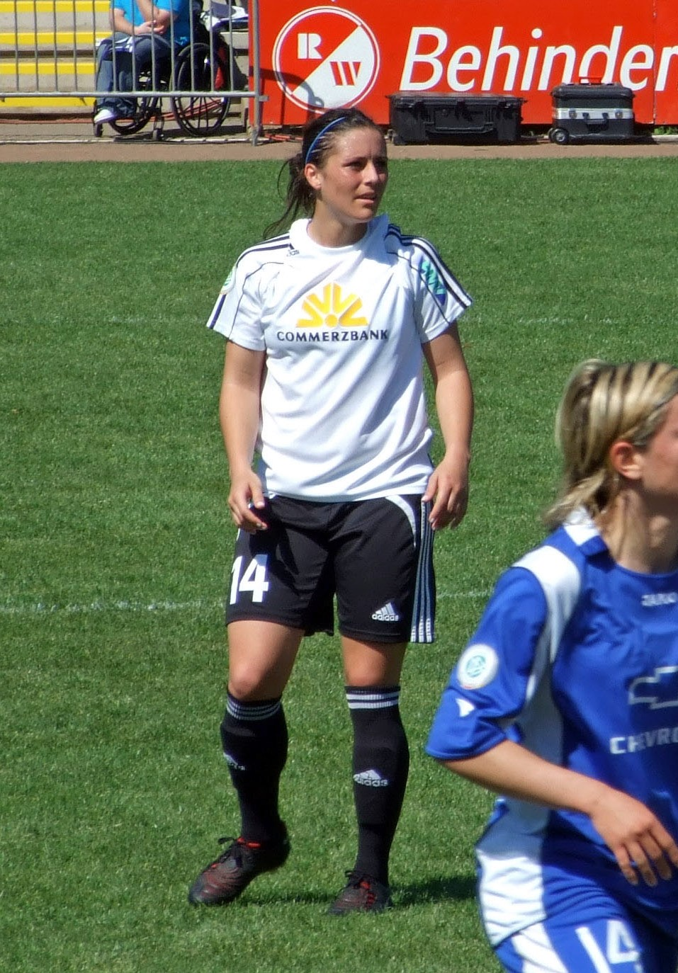 Alexandra Krieger vom 1.FFC Frankfurt, 2008